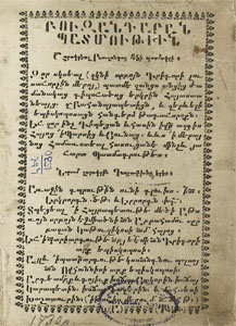 Обложка издания "Истории" Фавстоса Бузанда, 1730 год, Константинополь